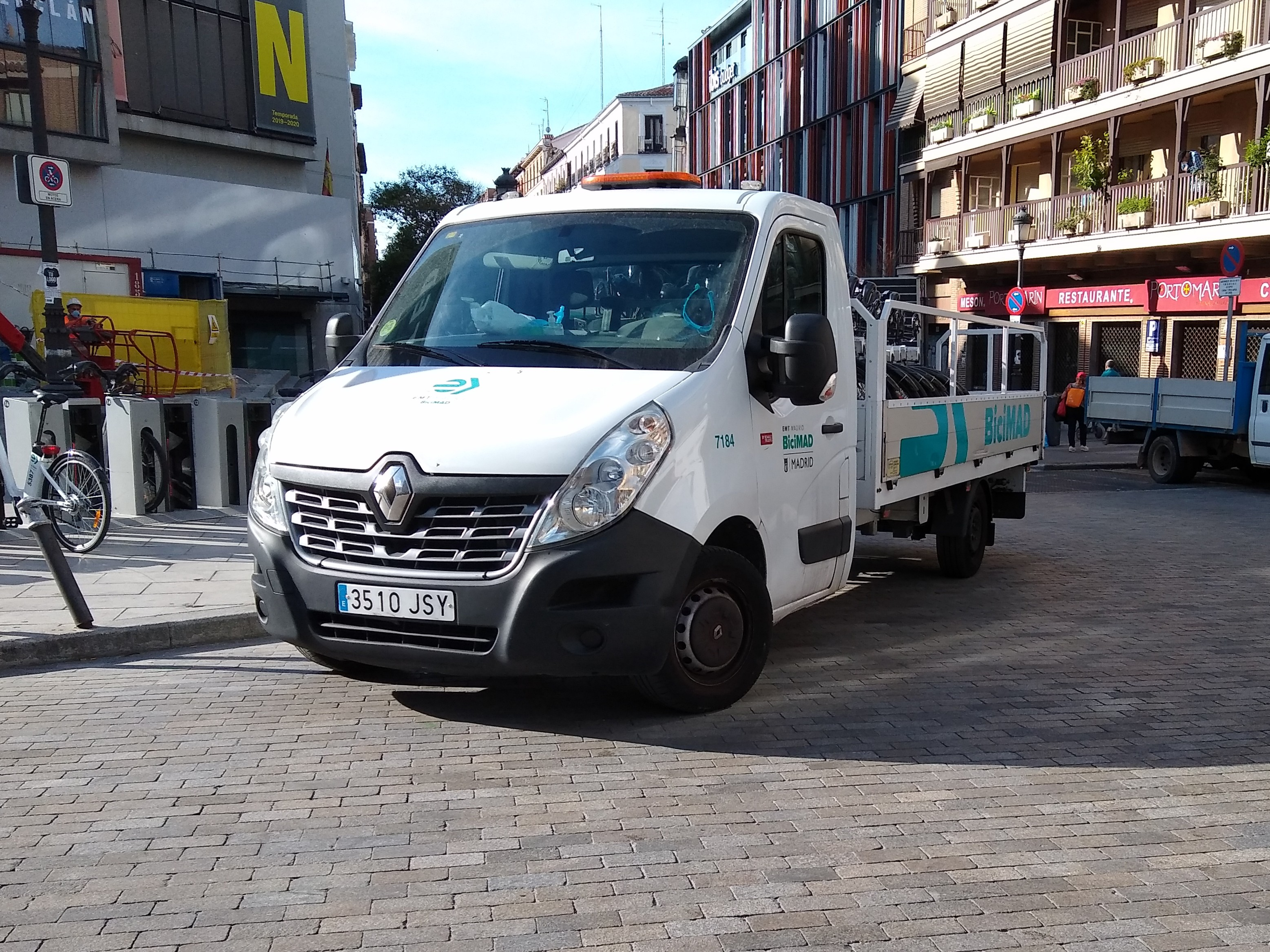 Camión de transporte de bicicletas de BiciMad